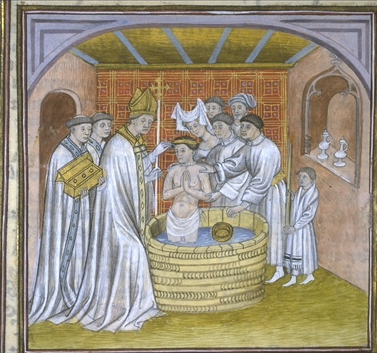 Gui, archevêque de Rouen, baptisant Rollon, chef des Normands (911?)